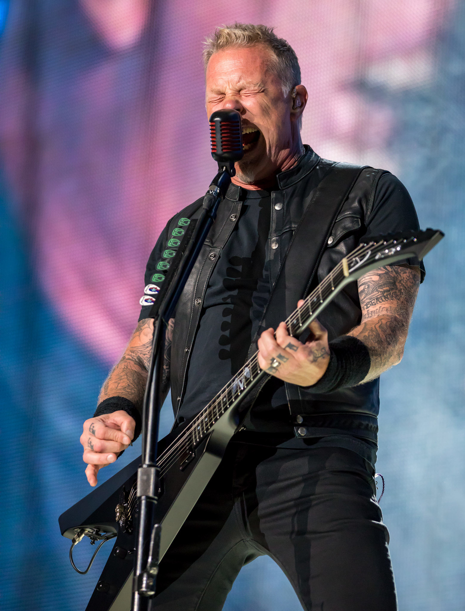 James Hetfield with Metallica performing in San Antonio, Texas (2017-06-14)